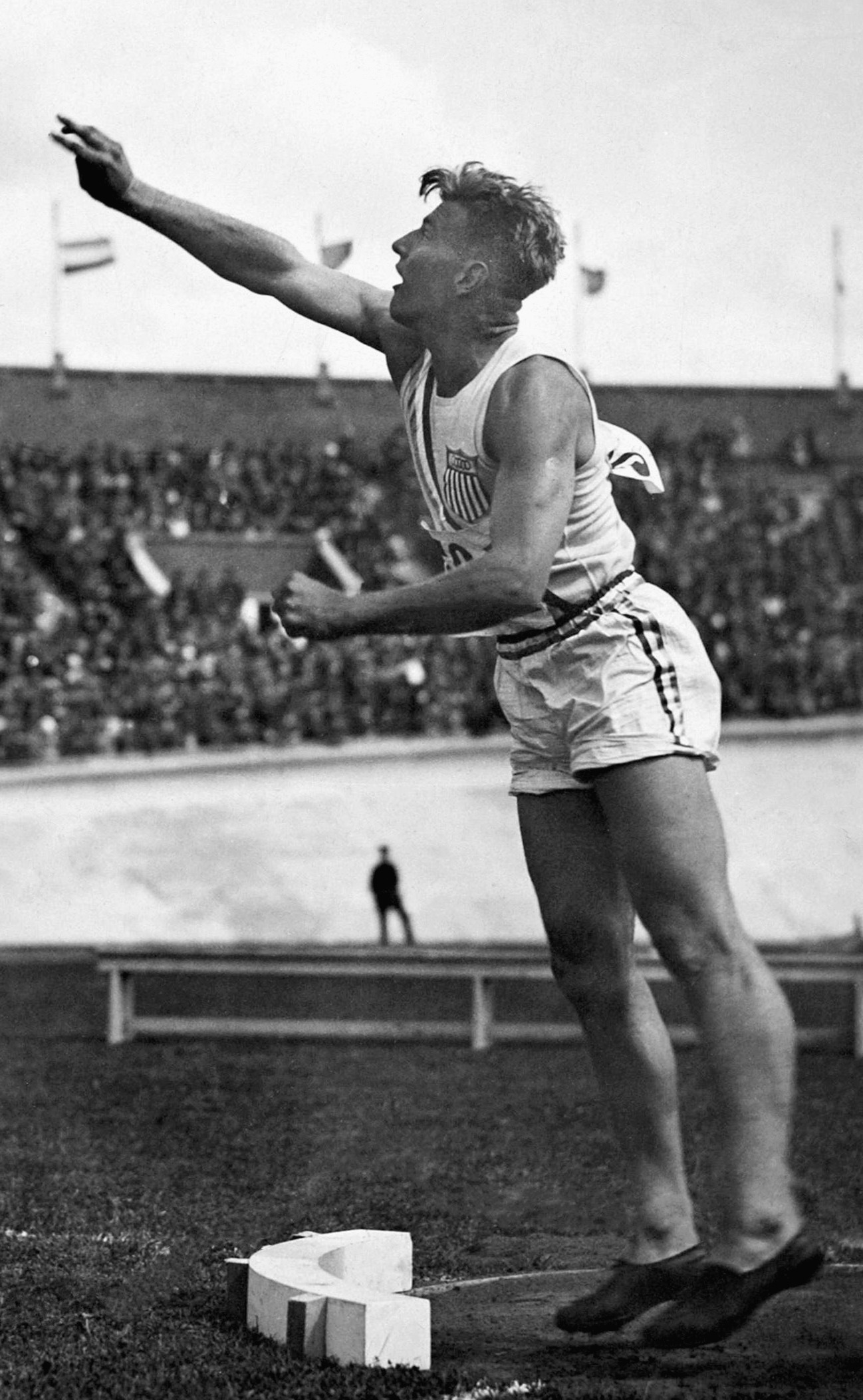 Sport. Sport, Olympische Spelen Amsterdam, 1928 : De Amerikaan Herman Brix (Bruce Bennett) tijdens het kogelwerpen. Hij werd tweede met 15.75 m.